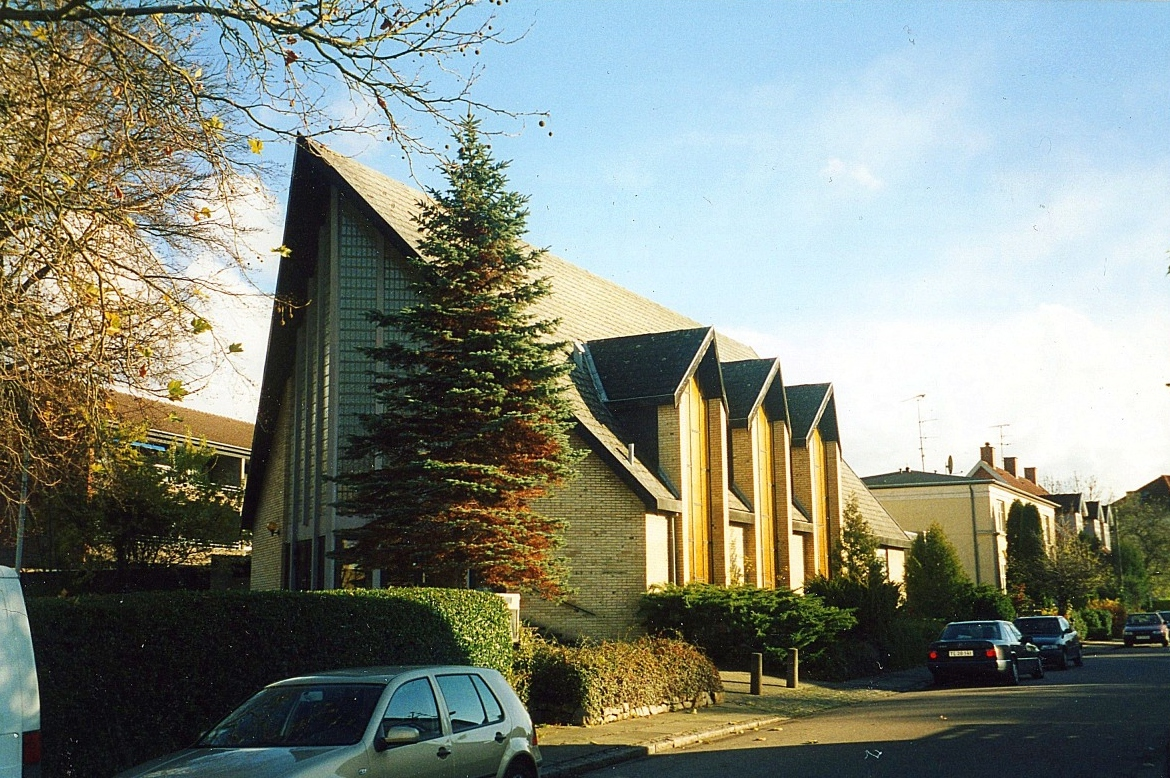 Baptistkirken, Lyngby-Taarbæk Kommune